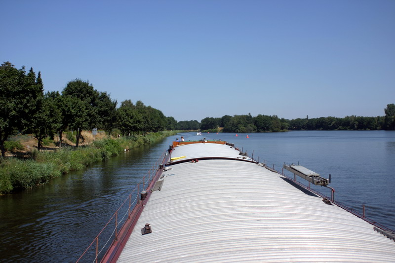 Einfahrt in den Lanzer See, von Lauenburg kommend.